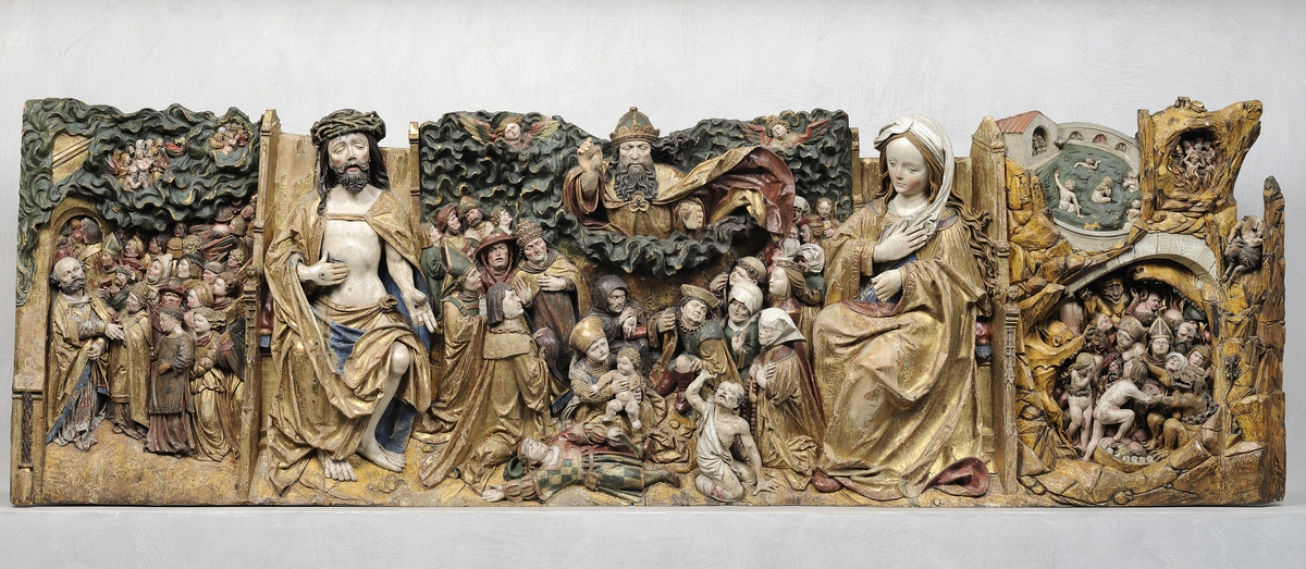 Statuette